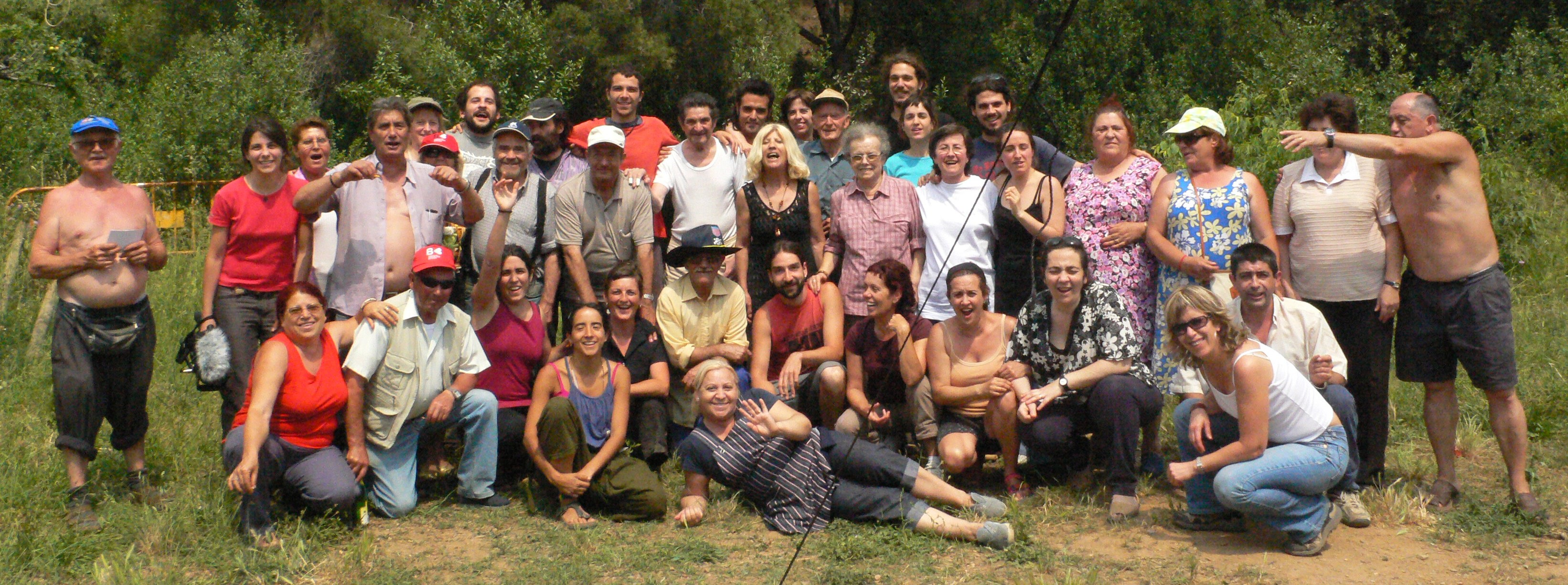 Los okupas de Can Masdeu tambien son contados como miembros de los Huertos Comunitarios del valle.